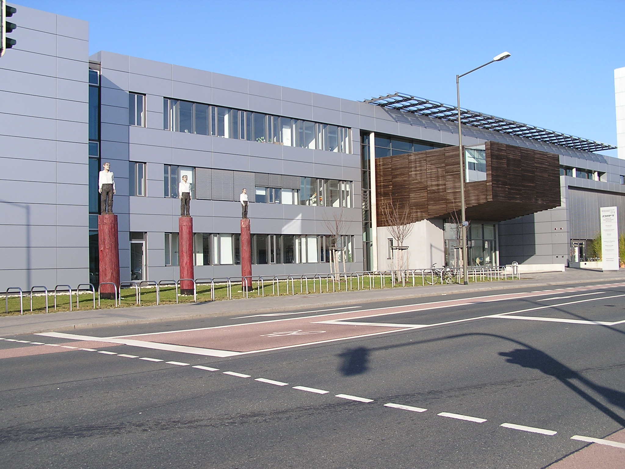 Innovationszentrum Medizintechnik und Pharma (IZMP) Erlangen, Stephan Balkenhol